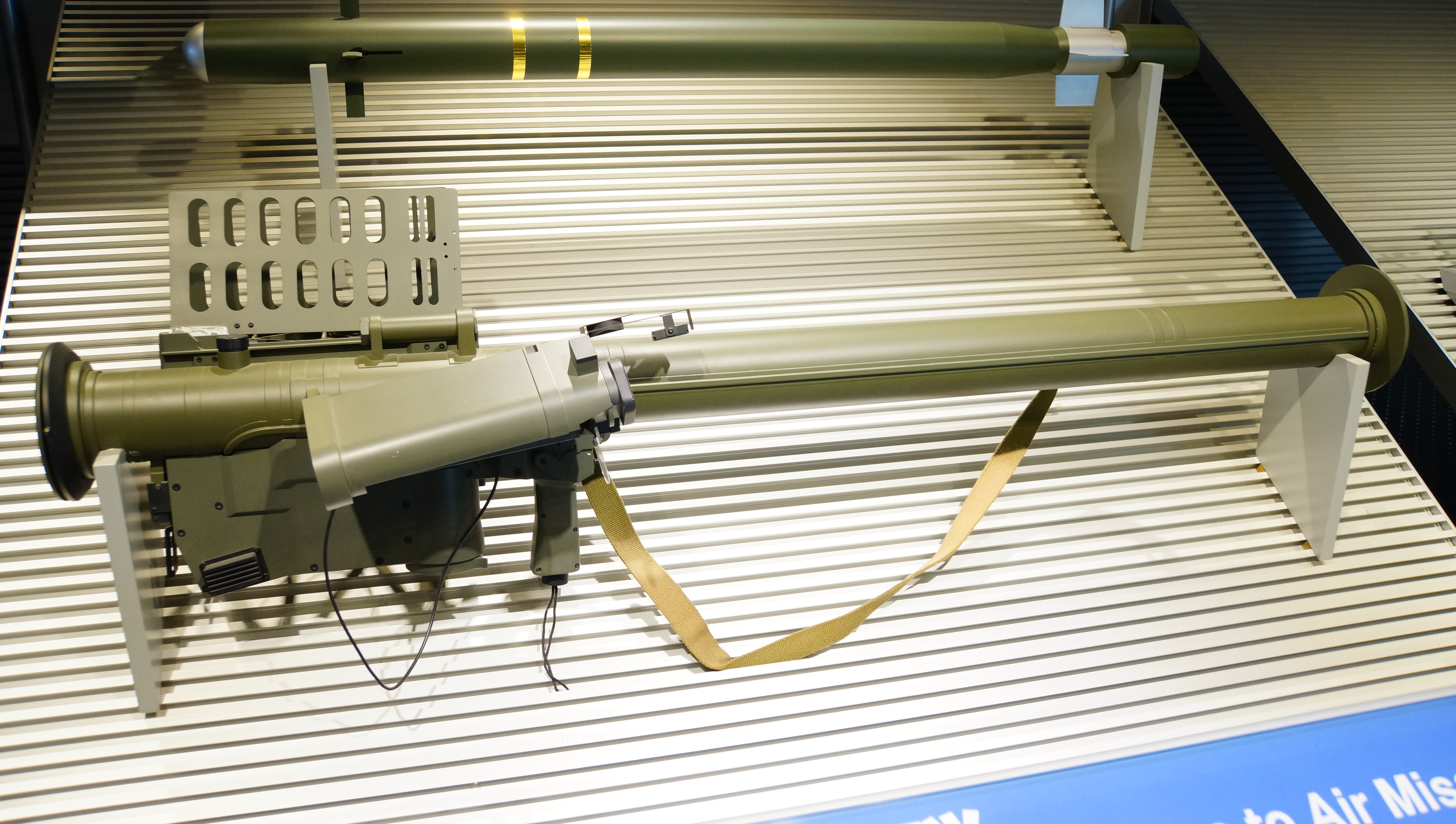 航空自衛隊 91式携帯地対空誘導弾（SAM-2） 発射機。 14年11月24日 浜松基地広報館内にて。